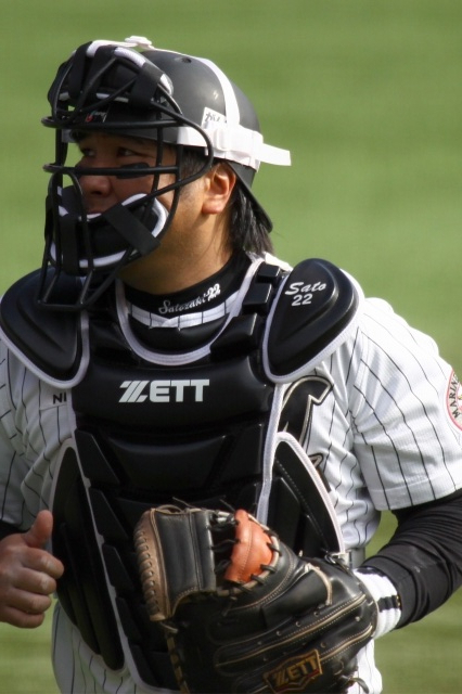 日本プロ野球 千葉ロッテマリーンズ 里崎智也 捕手